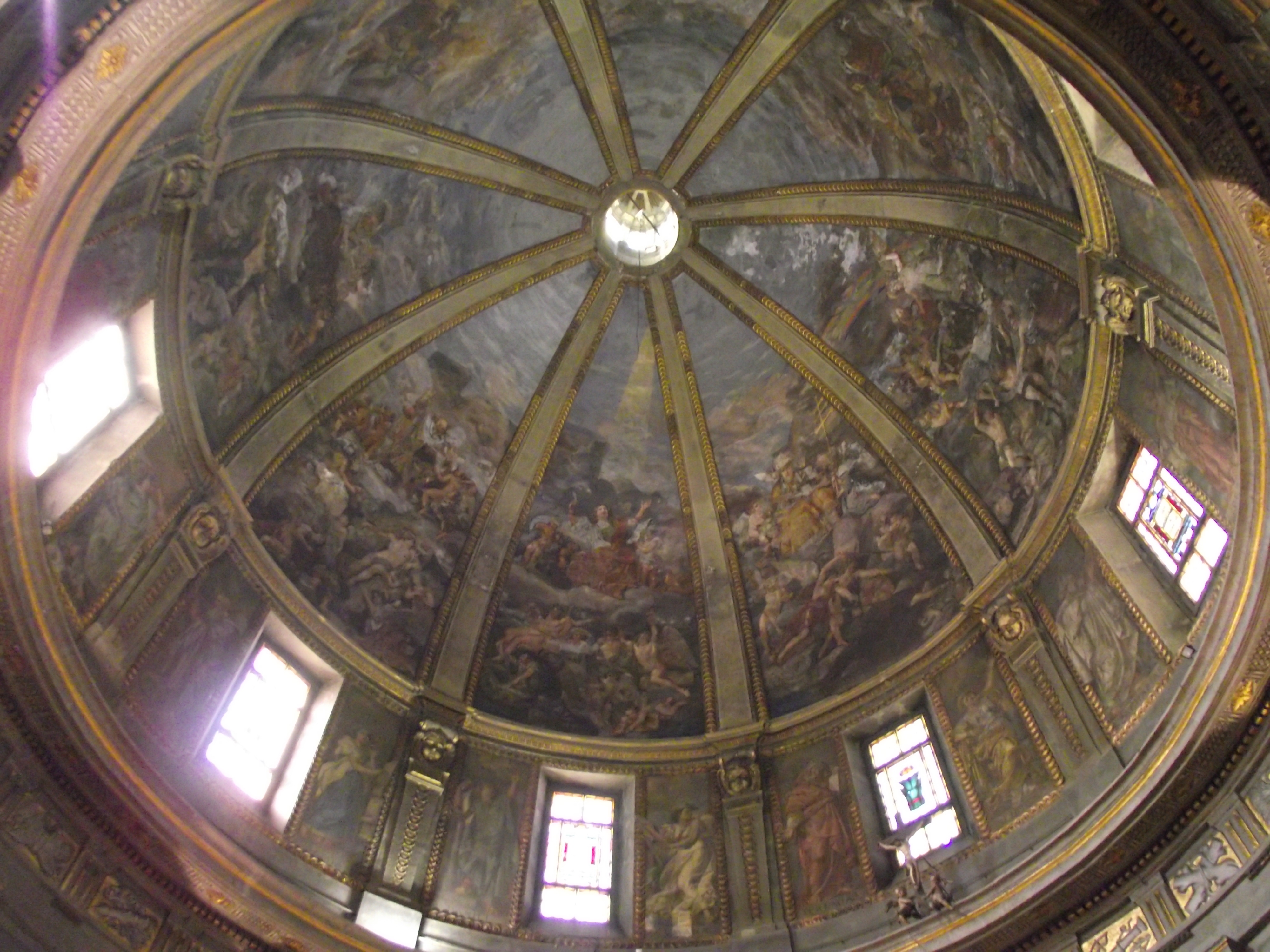 Cupola